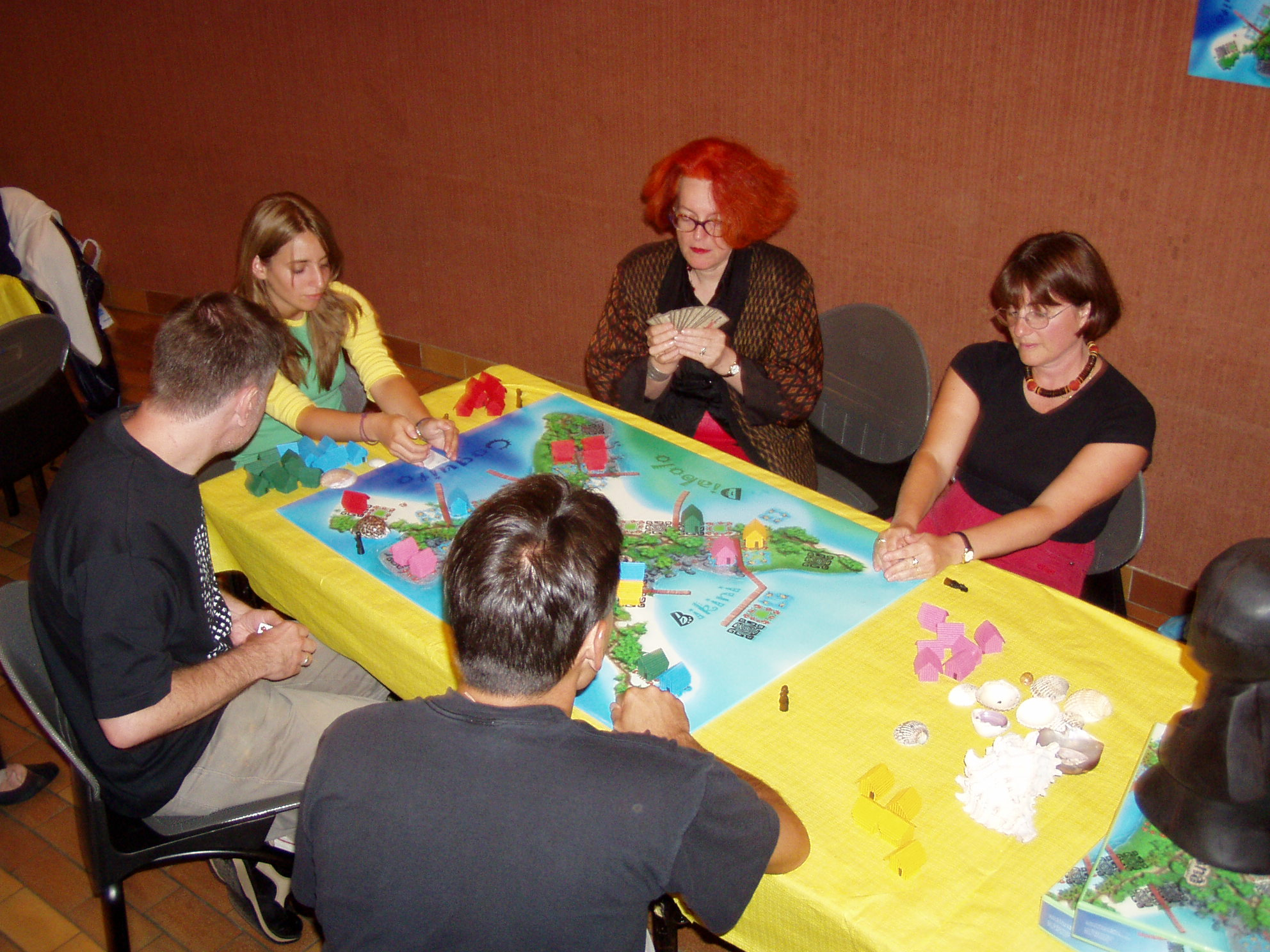 Photo du jeu Maka bana prise à Besançon. FH 22 décembre 2005 à 15:58 (CET) Catégorie:Photo de jeu de société